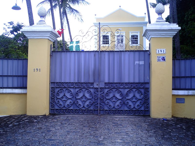 Residencia dos Arautos do Evangelho em recife.